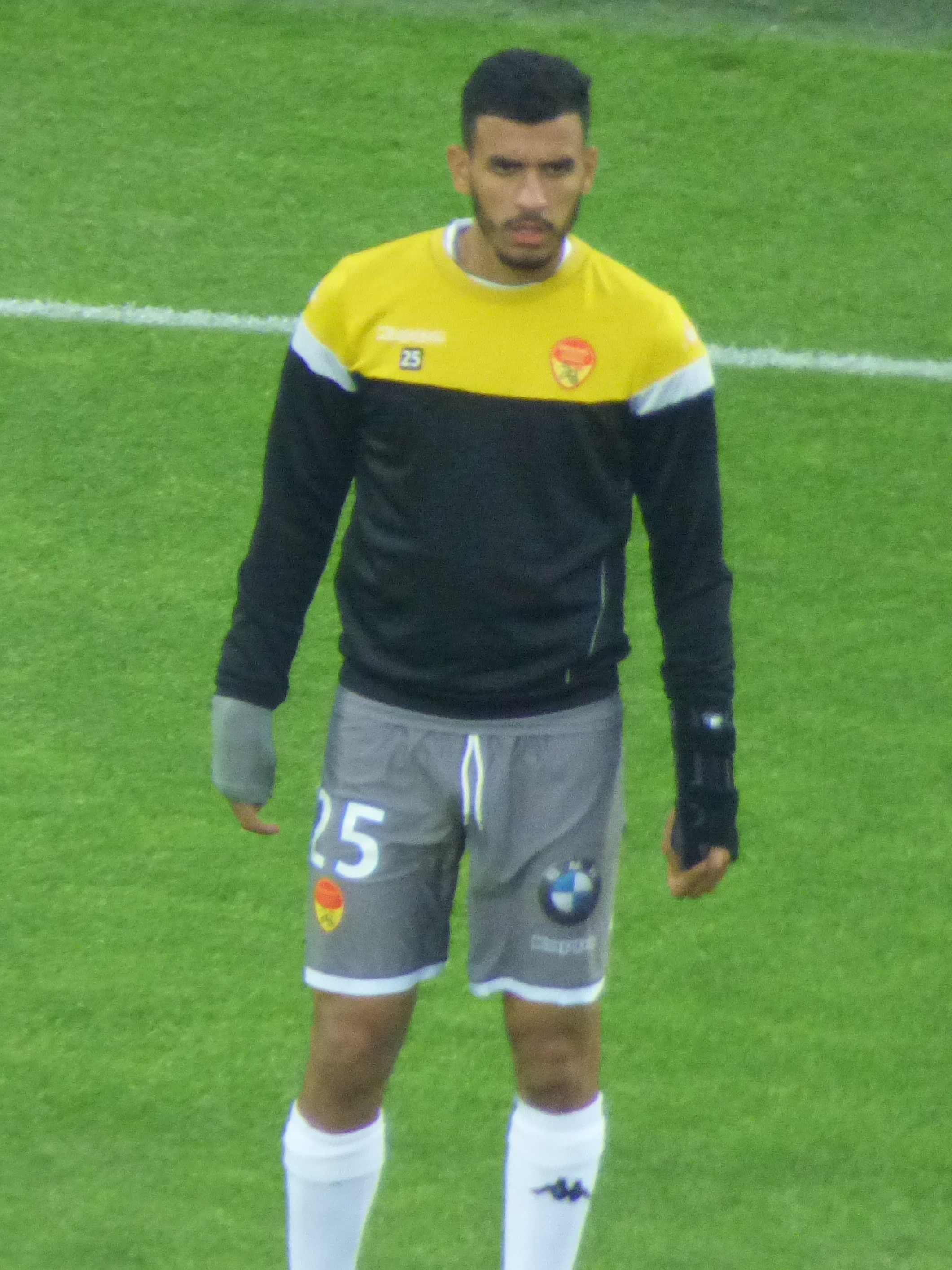 Fahd El Khoumisti avant le match RC Lens / US Orléans, le 17 mai 2019, comptant pour la 38ème journée du championnat de France de football de Ligue 2 2018-2019, au Stade Bollaert-Delelis.